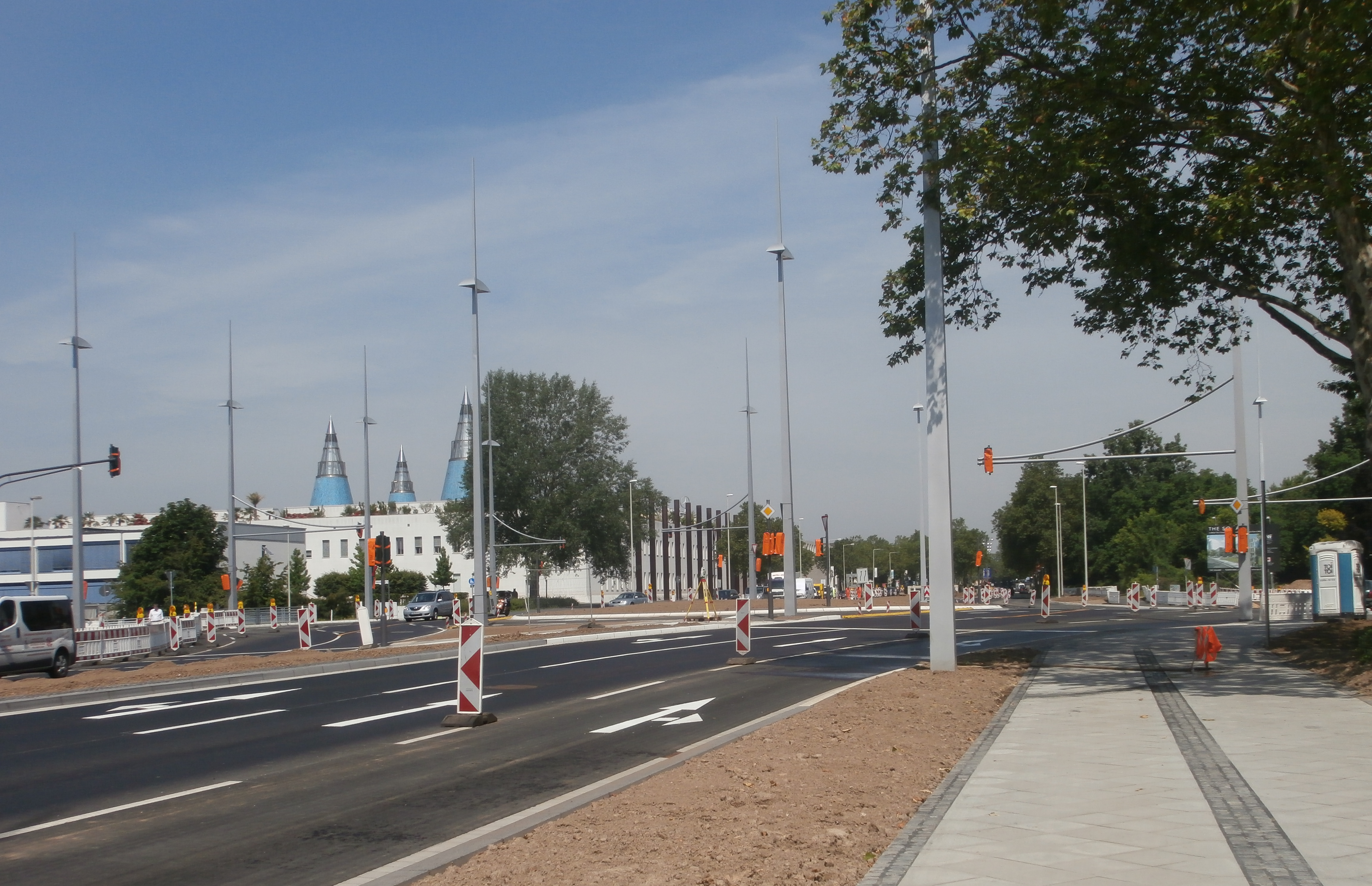 „Trajektknoten“ (Kreisverkehr an der Kreuzung der B 9/Friedrich-Ebert-Allee mit Franz-Josef-Strauß-Straße und Marie-Kahle-Allee) kurz vor Fertigstellung, Bonn